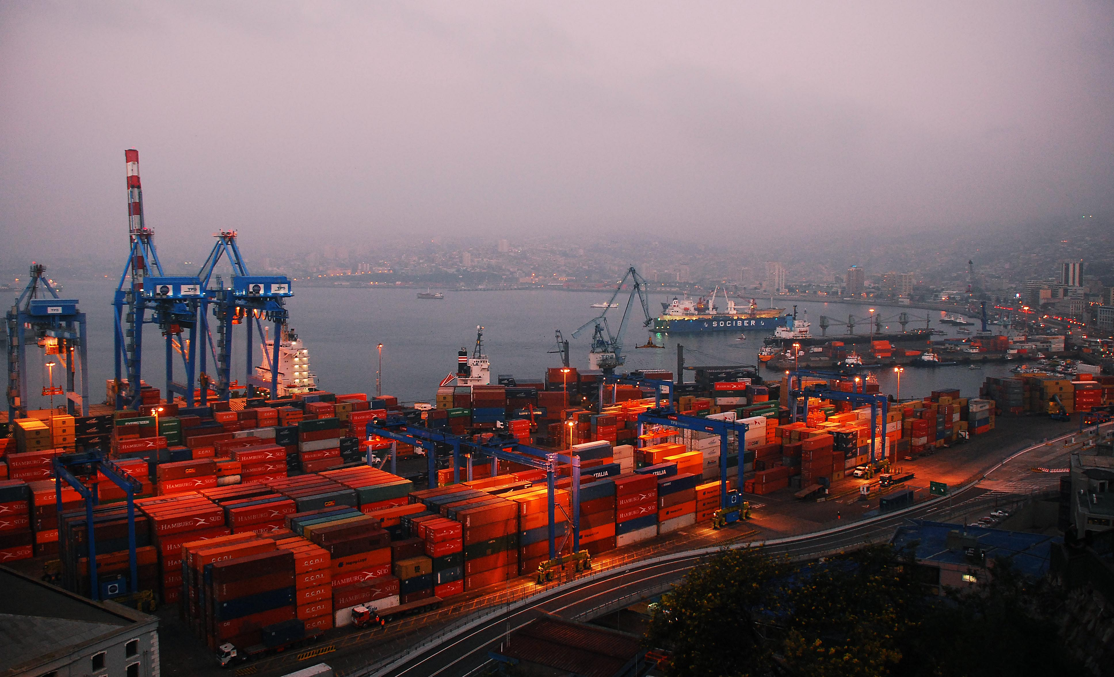 Valparaiso